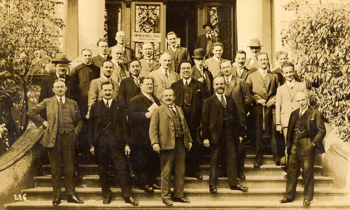 Partoprenantoj de Esperanto-konferenco en Locarno, 1926